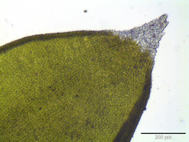 Graue Zackenmütze (Racomitrium canescens), papillöses Glashaar (125x)